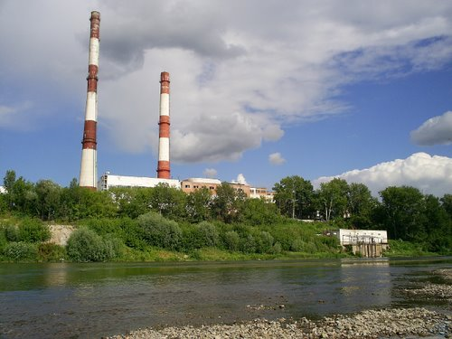 Ишимбайская ТЭЦ, вид с острова на реке Белой, 1.08.2008